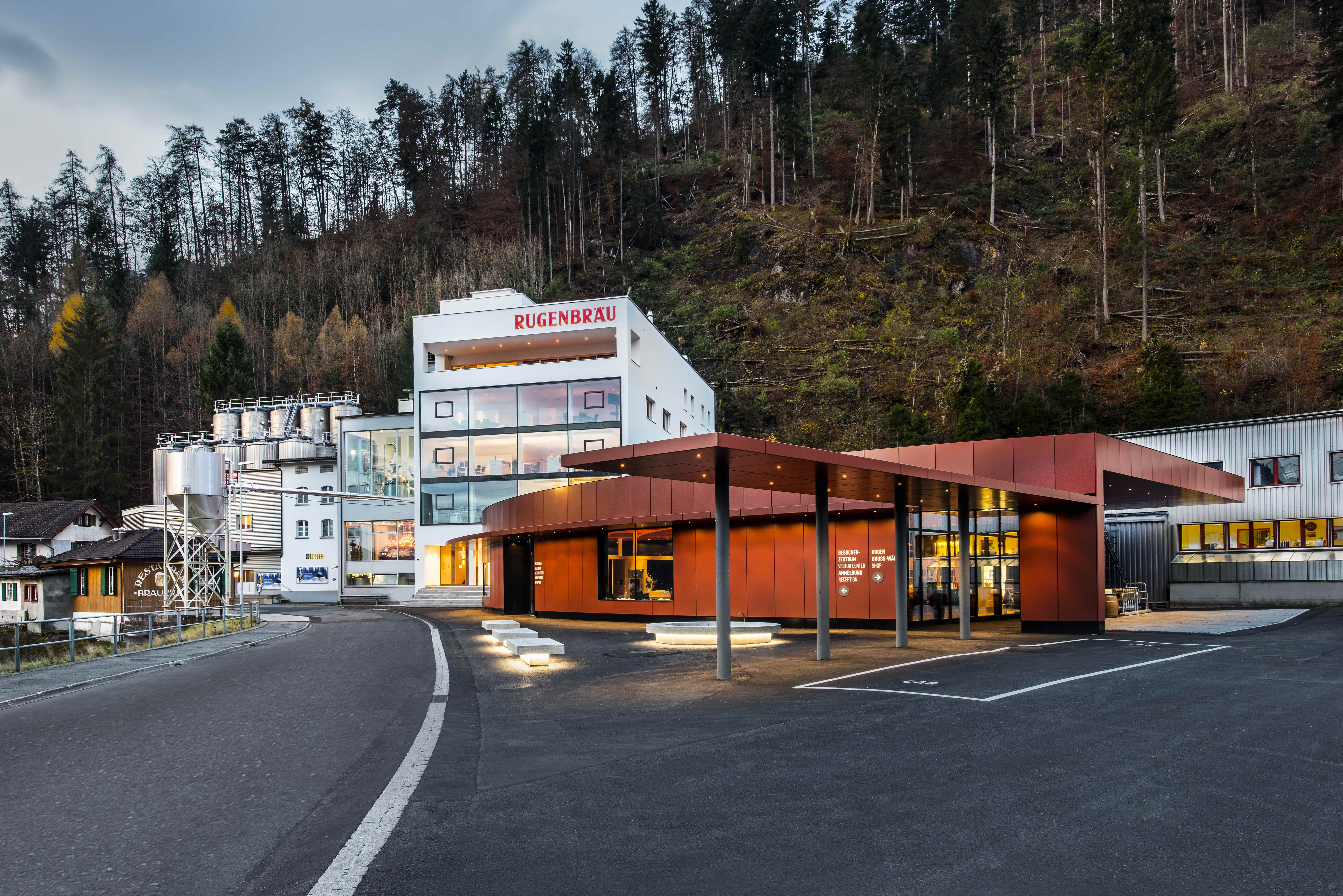 Brauerei inkl. Bürogebäude und Laden